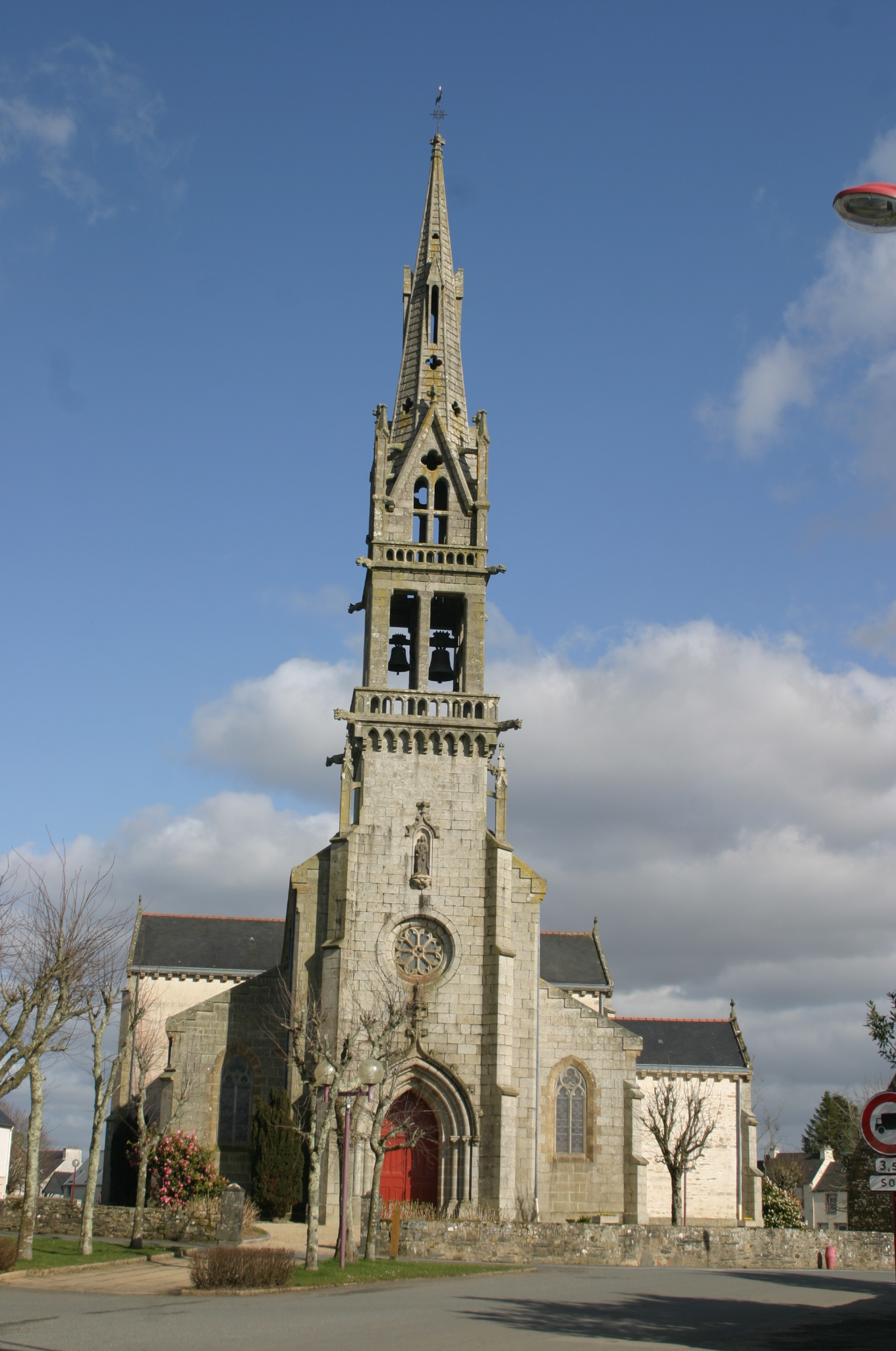 Église Saint-Pierre